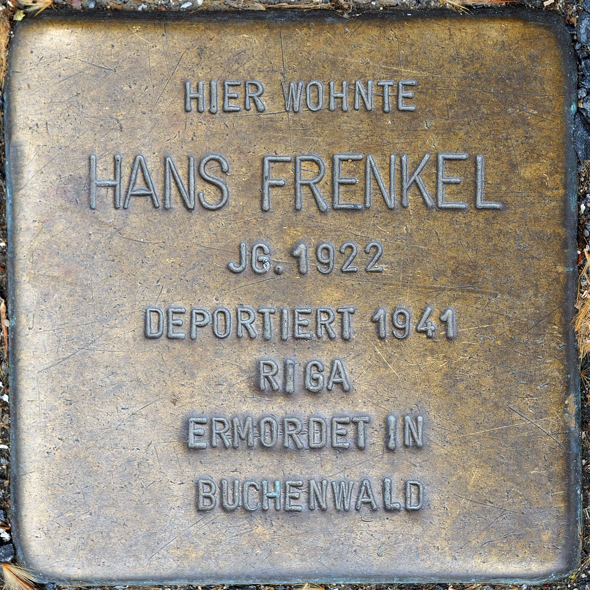 Stolpersteine MG: Frenkel, Hans